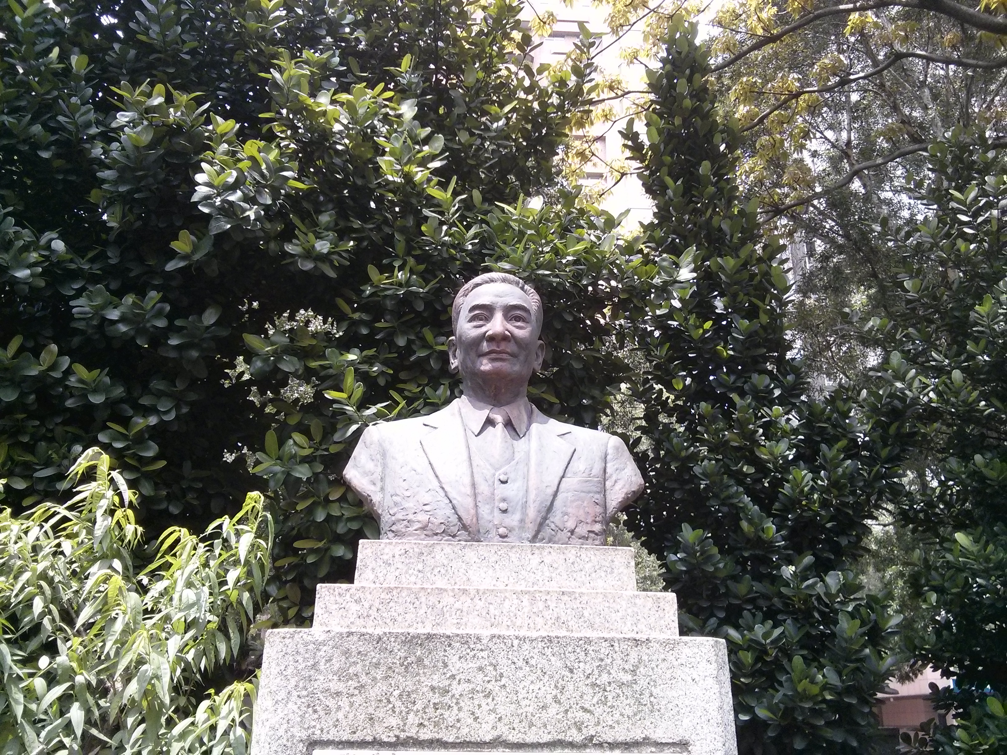 國立臺灣師範大學校內的前校長劉真胸像